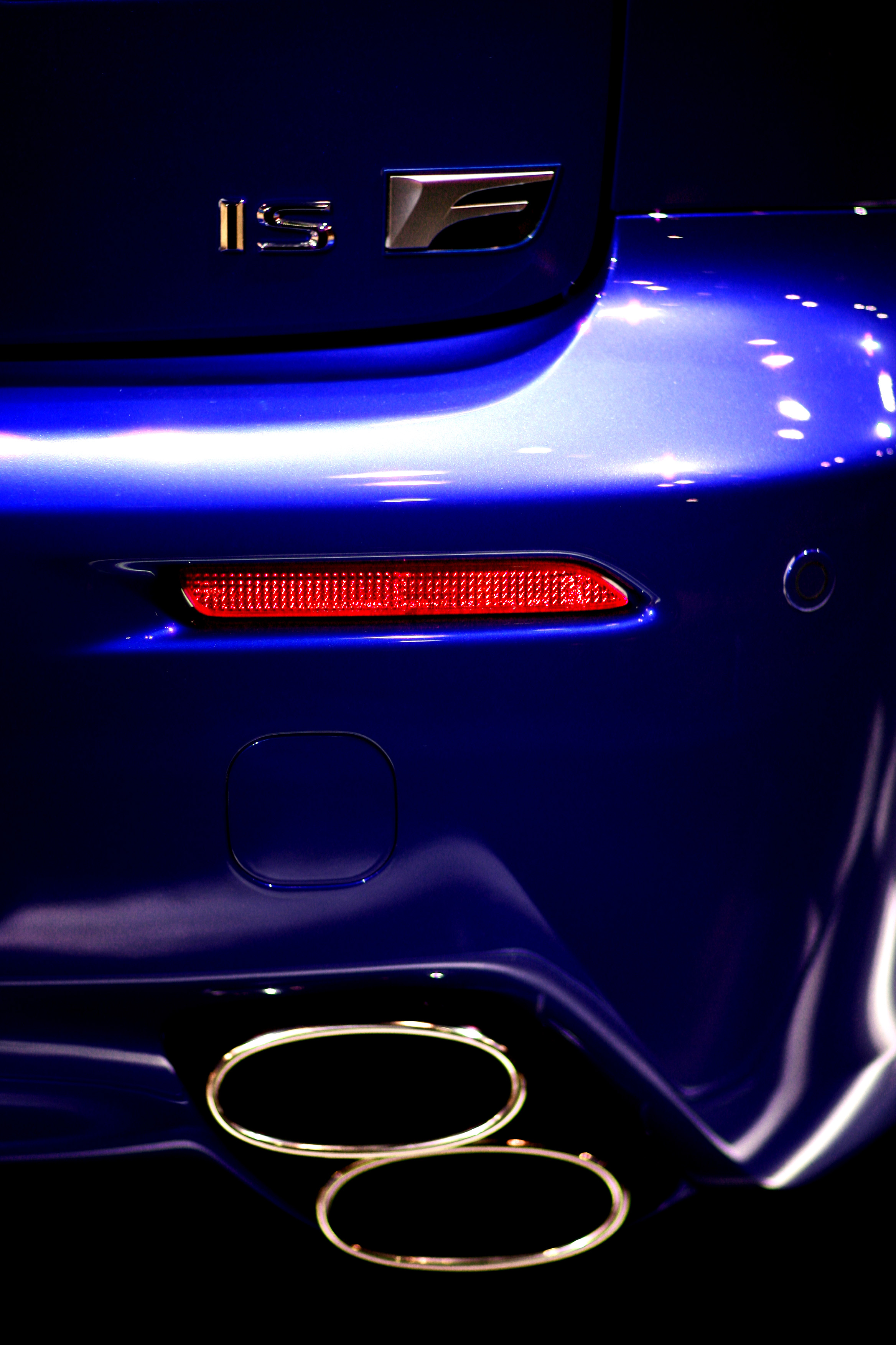 Lexus IS F